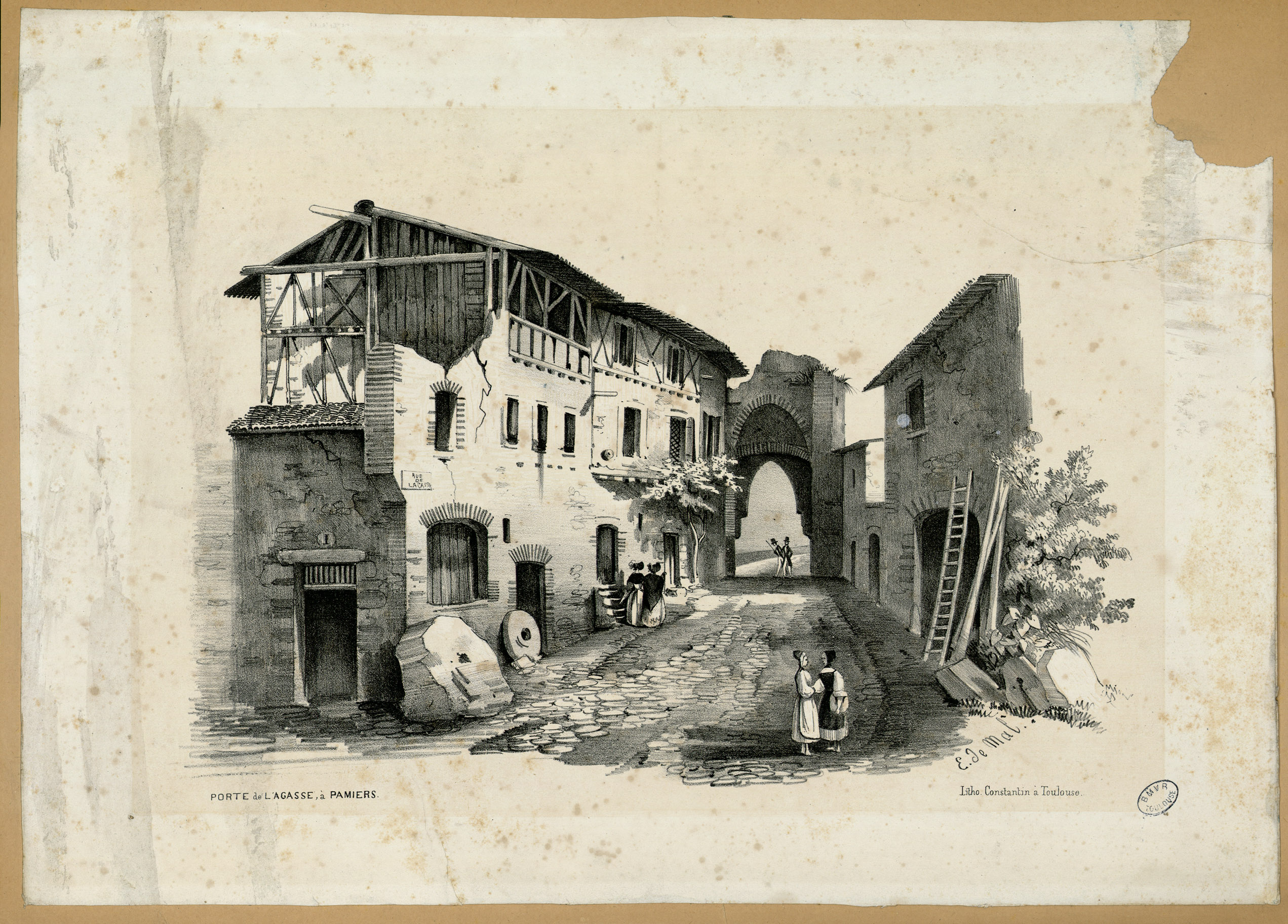 Fait partie d'un recueil de 23 planches lithographiées en camaïeu Ancely, René (1876 - 1966). Possesseur